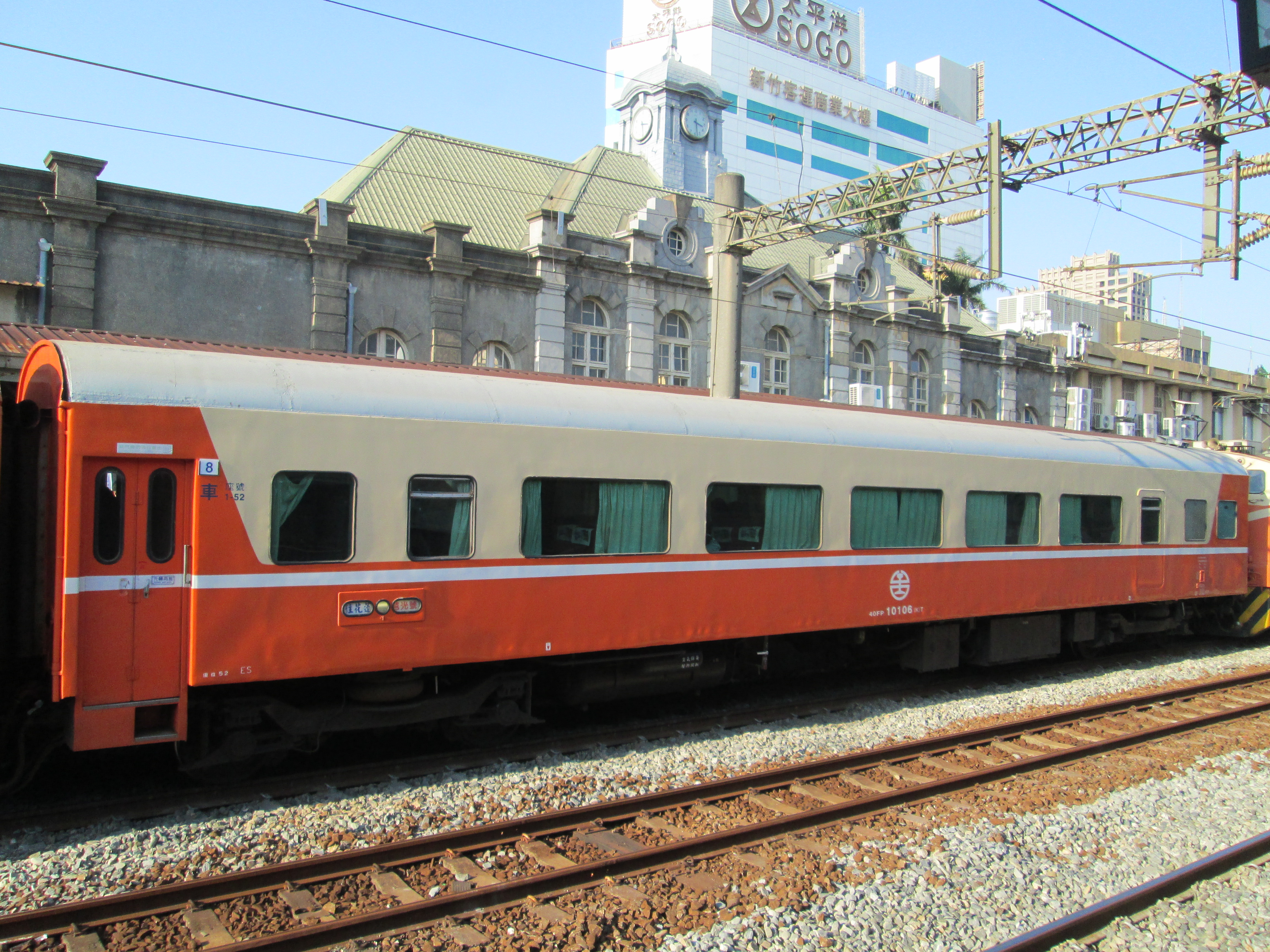 40FP10106(K)T